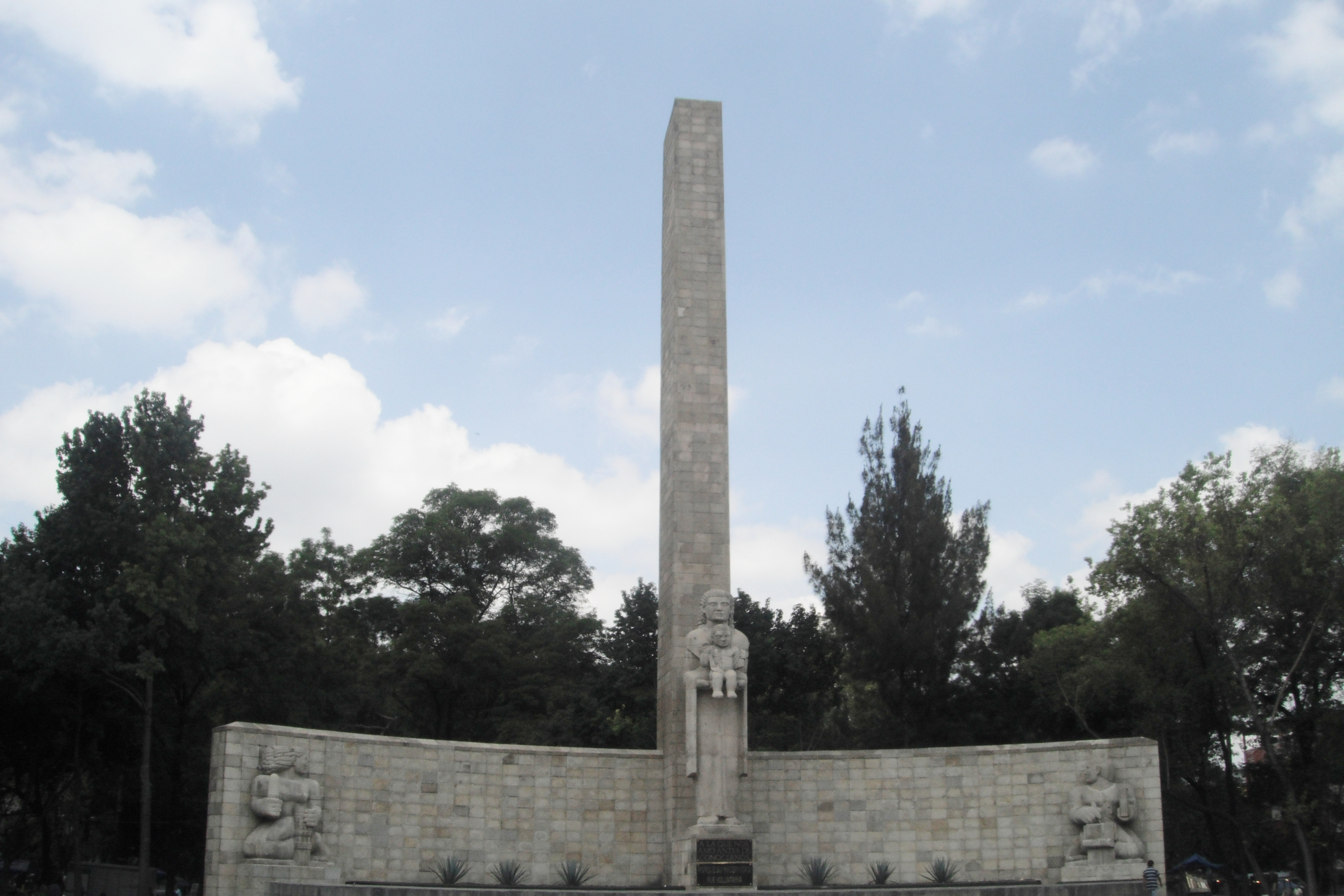 Se inició su construcción en 1944 y se termino cinco años después. Debido a que el periódico Excelsior fue el que tuvo la idea de establecer el 10 de mayo como Día de la Madre, también convocaron a un concurso para ver quien sería el encargado de las esculturas que se encuentran en la base, siendo la obra de Luis Ortíz Monasterio las elegidas.